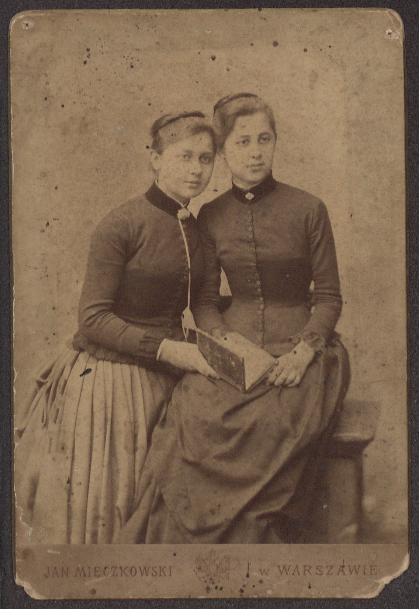 Wanda Szczawińska z siostra Jadwiga, ok. 1888 r.